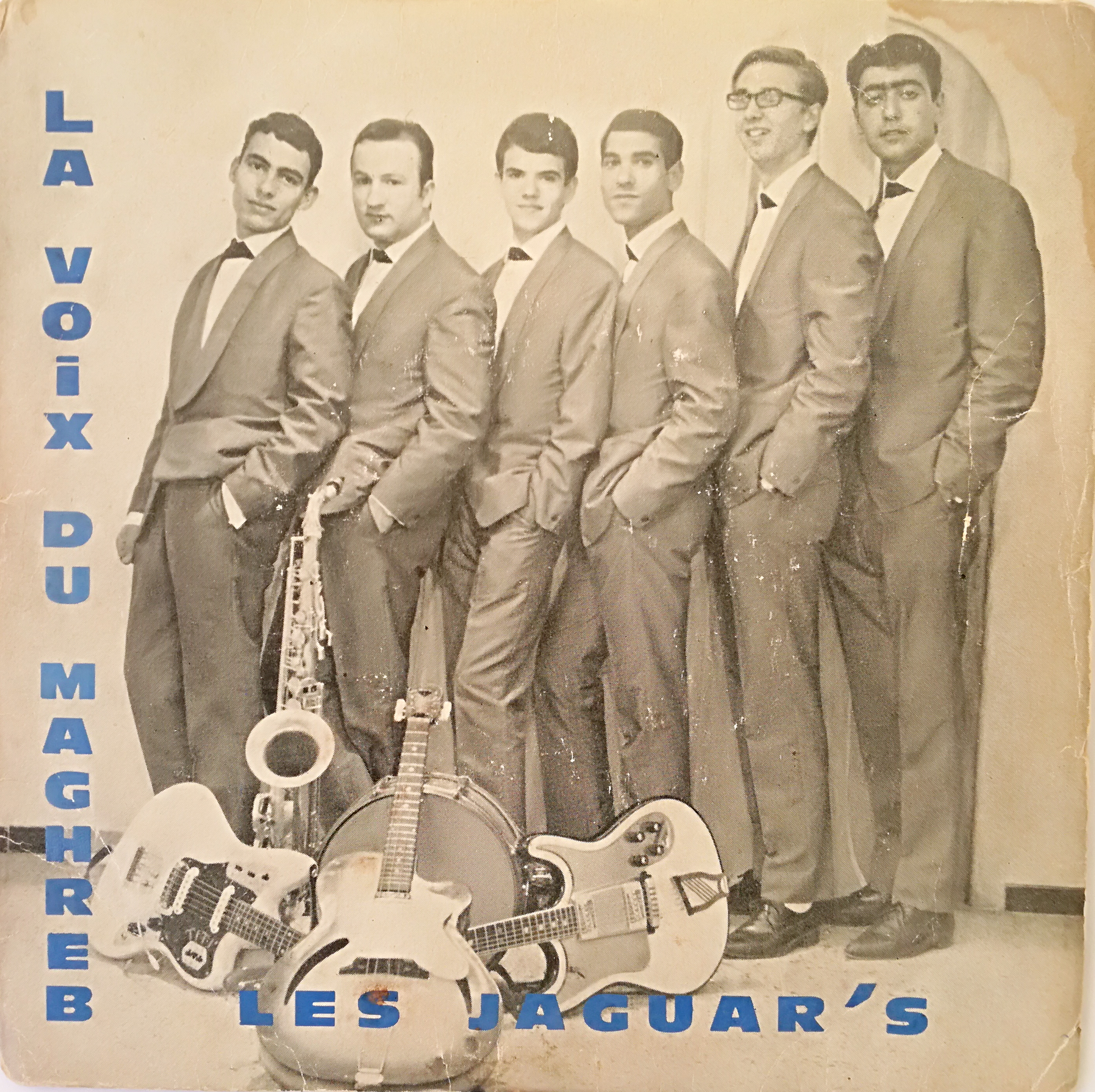 Premier disque du groupe d'Armand Lemal 1961